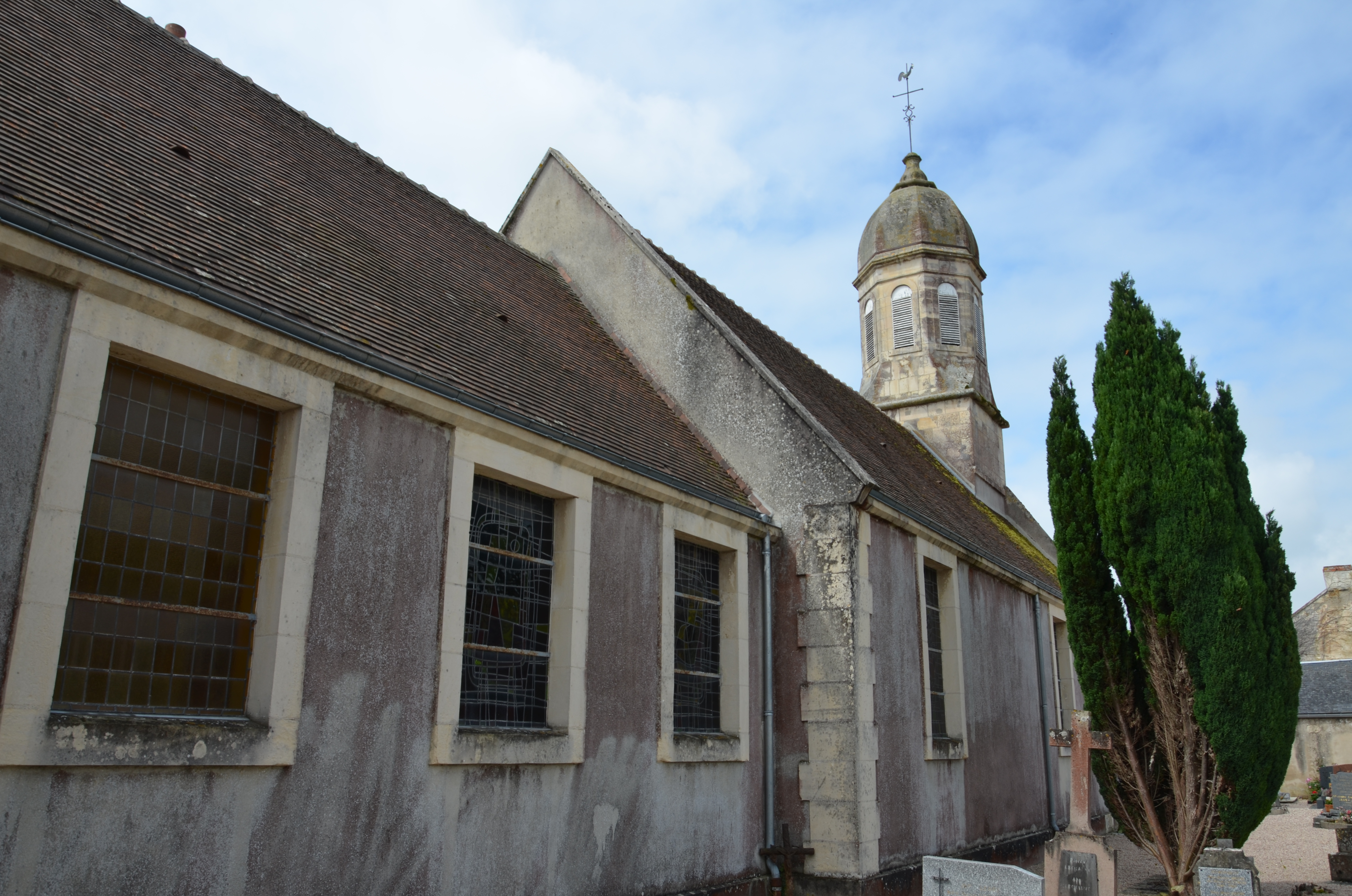 Église Saint-Pierre de Touffréville.